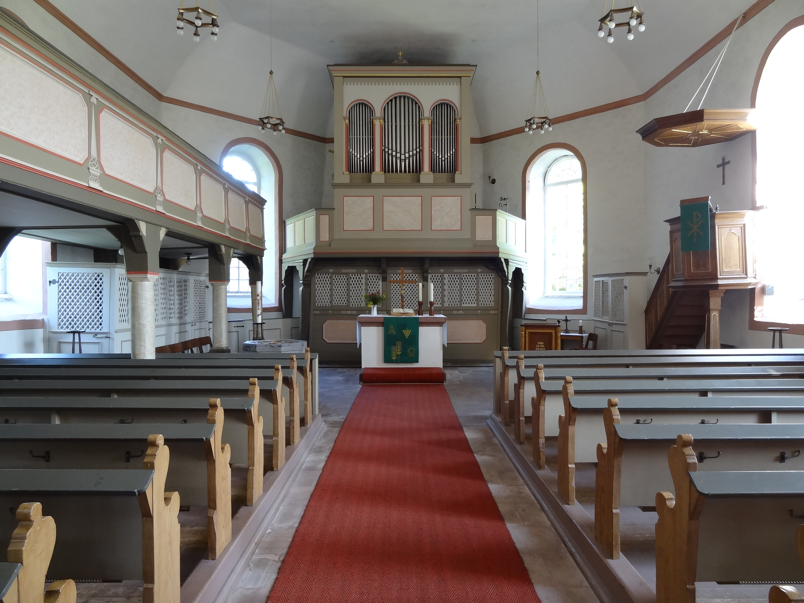 Kirche Wirberg